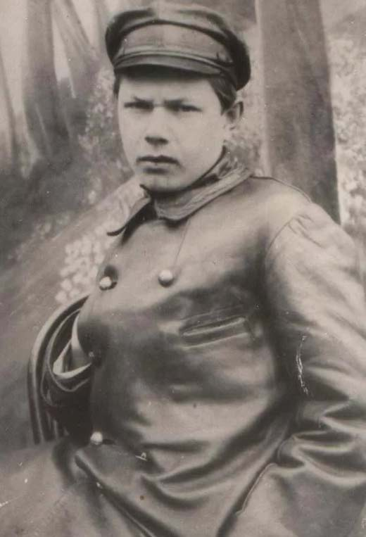 Иван Бусько — чекист, застреливший Лёньку Пантелеева